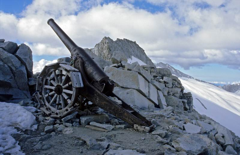 Die Canone 149 am Südgipfel der Cresta Croce, Adamellogruppe, Italien